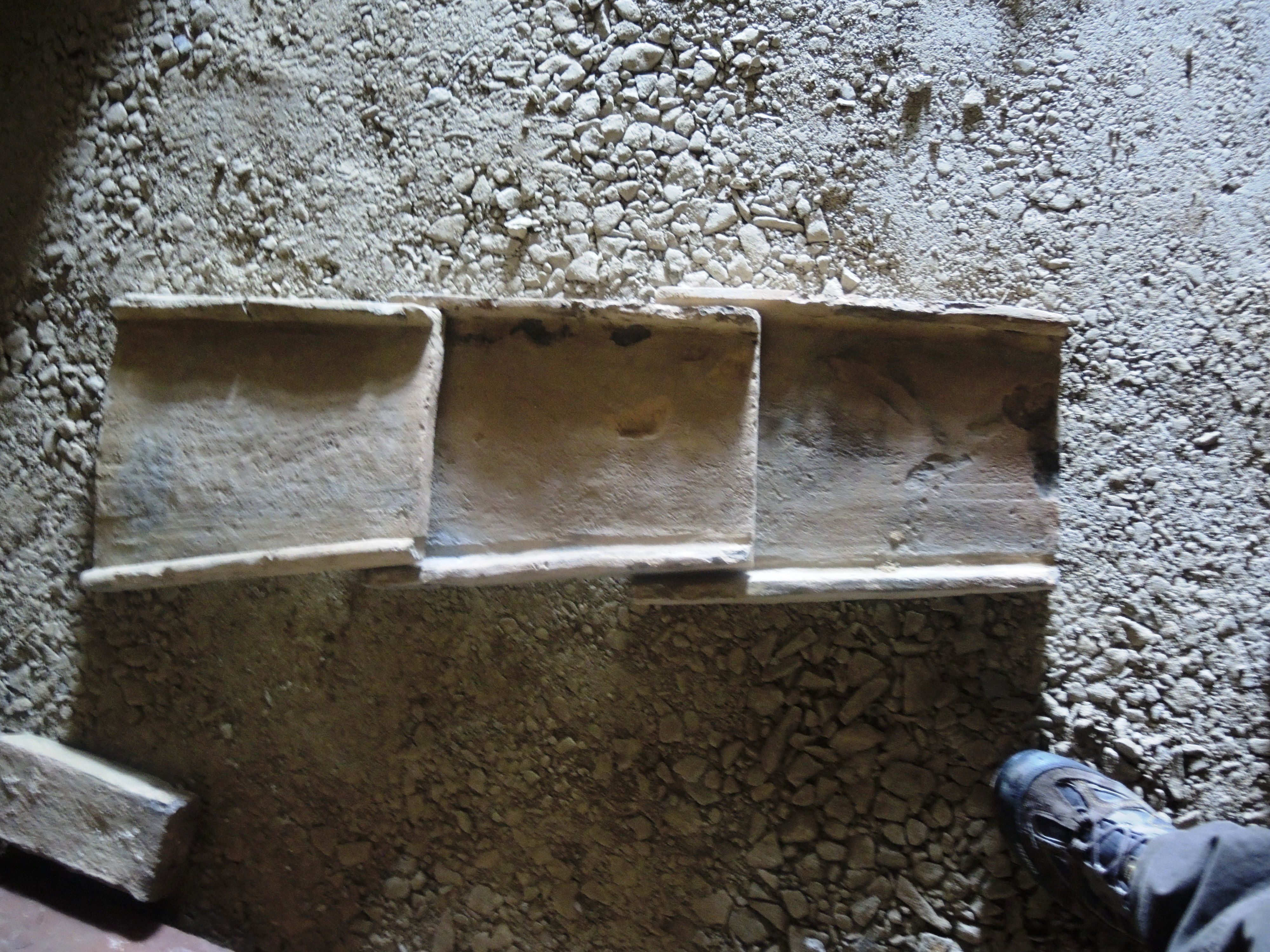 Saint-Etienne-de-Valoux détail